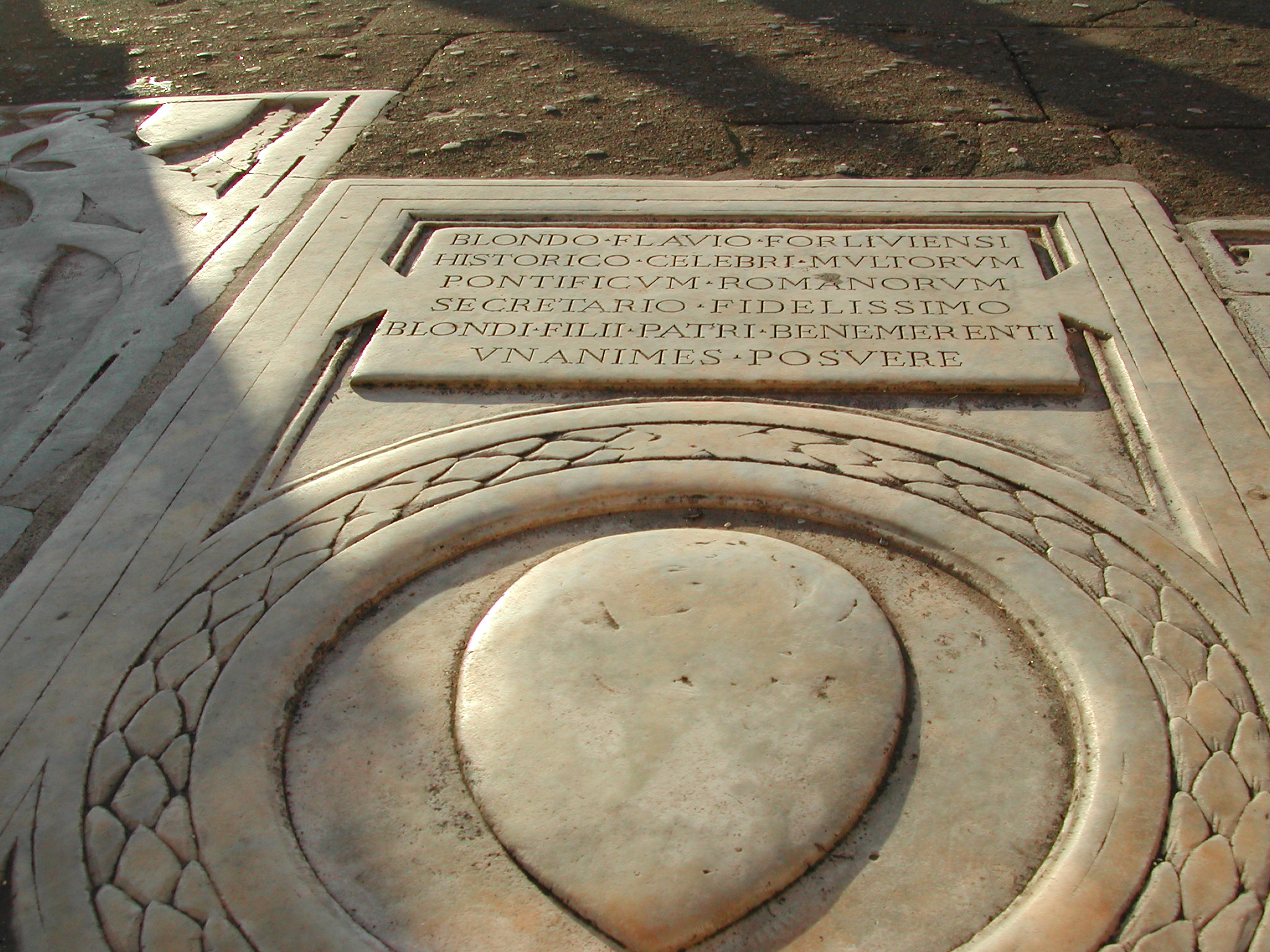 Roma, chiesa dell'Aracoeli: lapide funeraria dello storico Flavio Biondo, noto con il nome umanistico di Flavius Blondus.